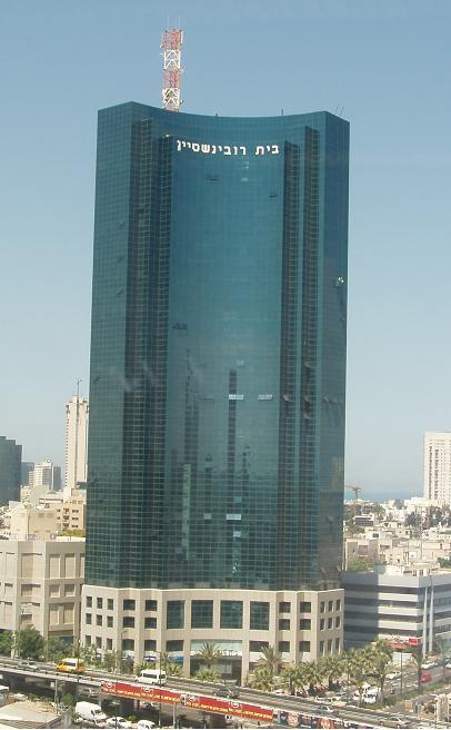 זכוכית: רב קומות בעל מעטפת זכוכית.